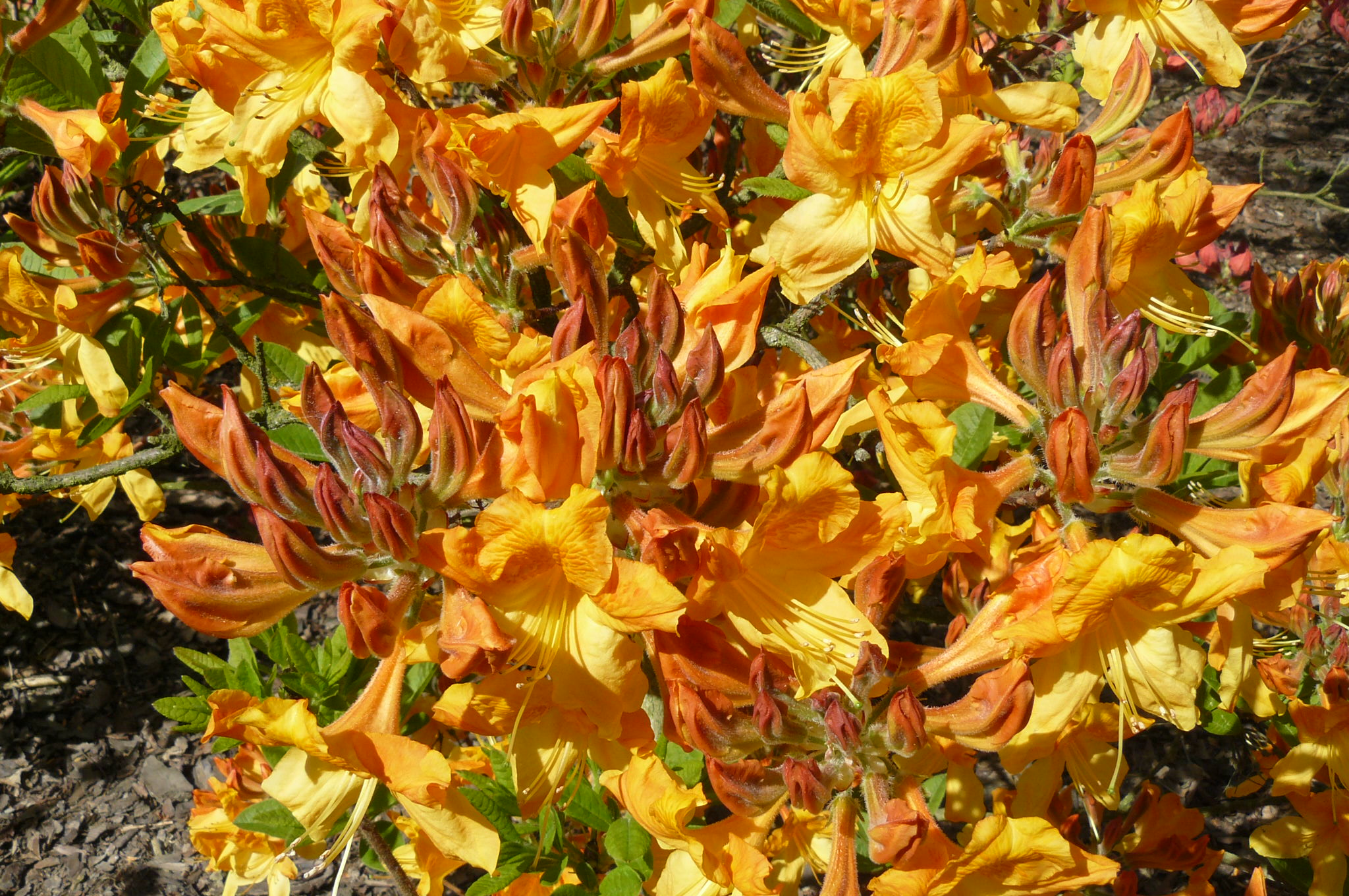 Arboretum Wojsławice.